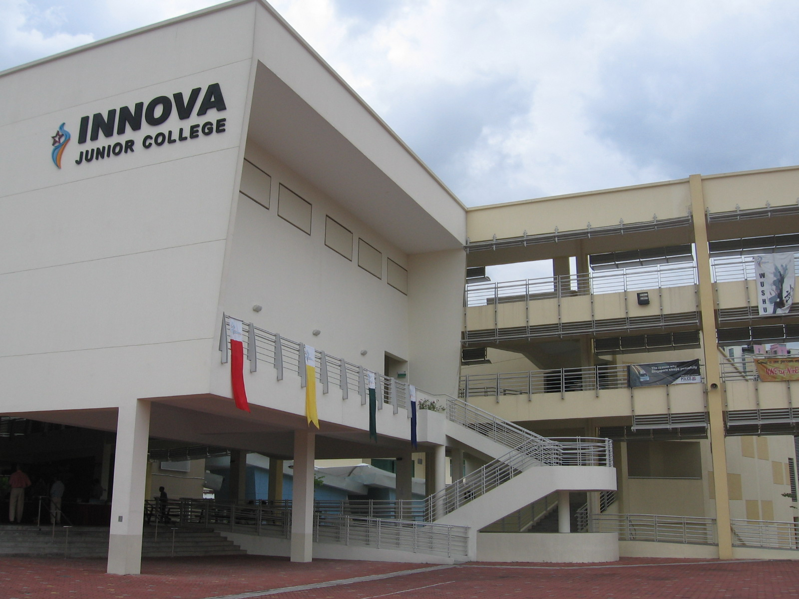 Innova Junior College